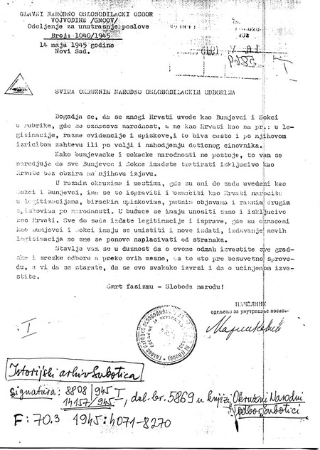 GNOOV 1040/1945